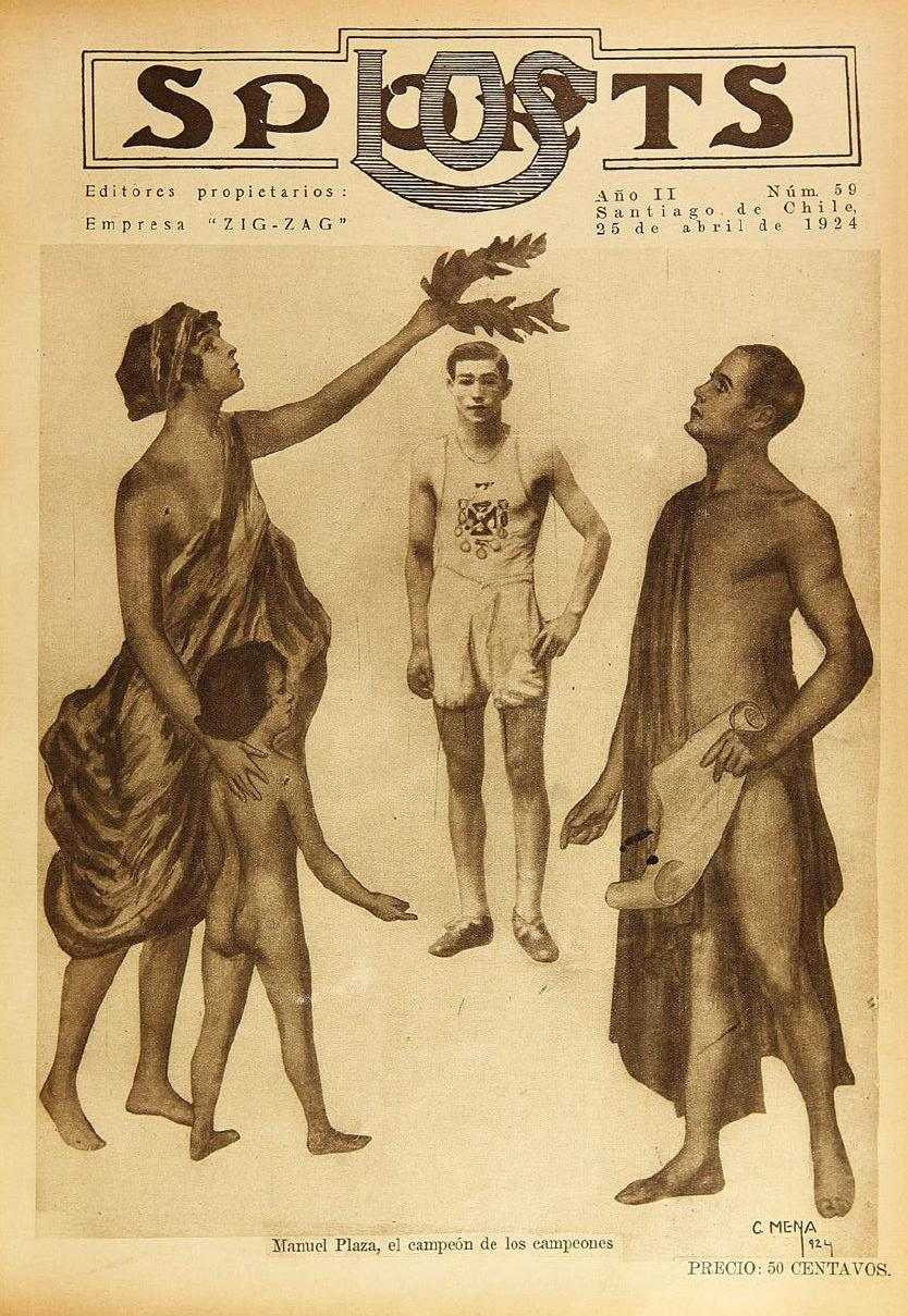 Manuel Plaza en portada de revista Los Sports